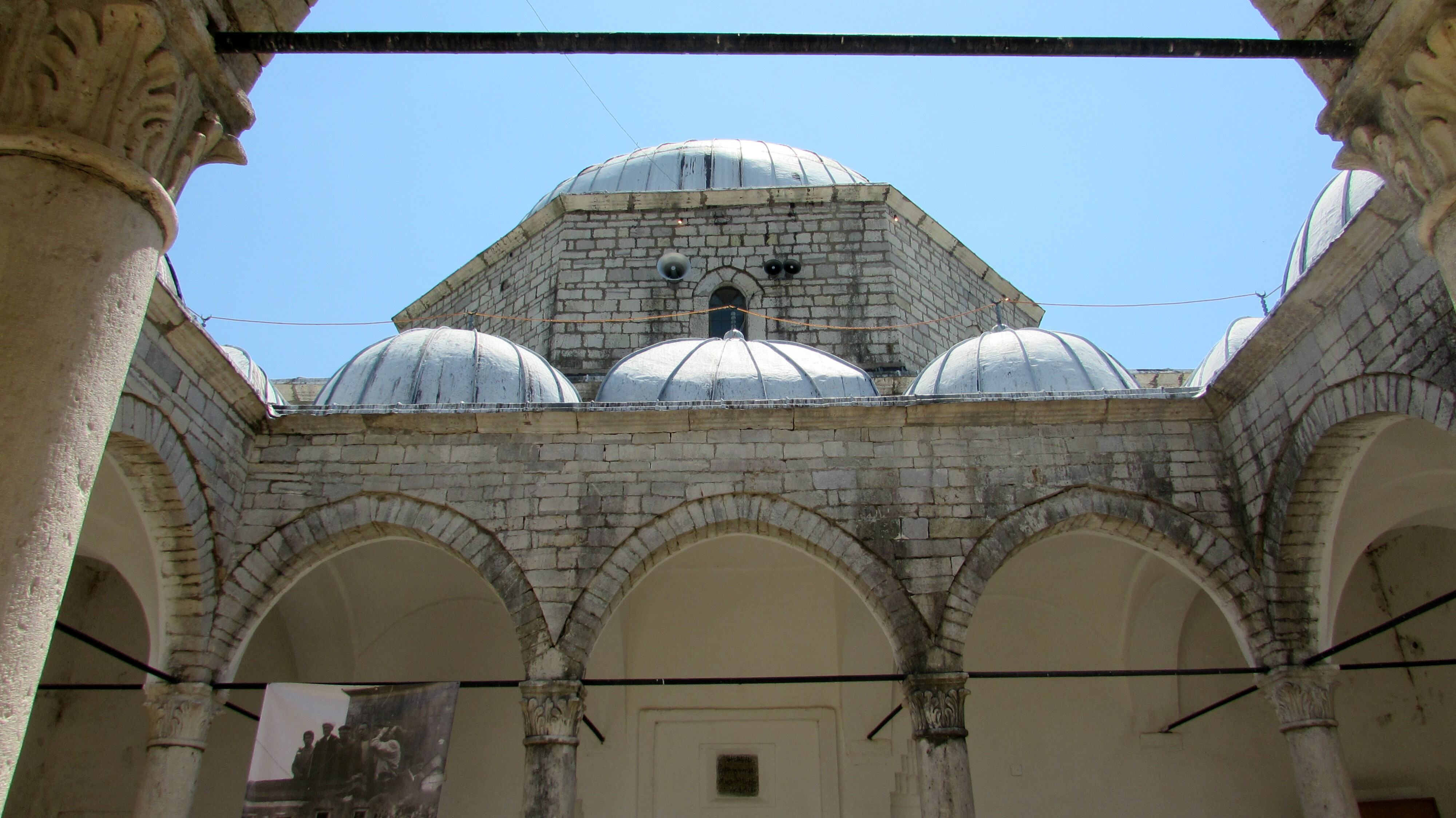 ShkodraBleimoscheeAnsicht2014